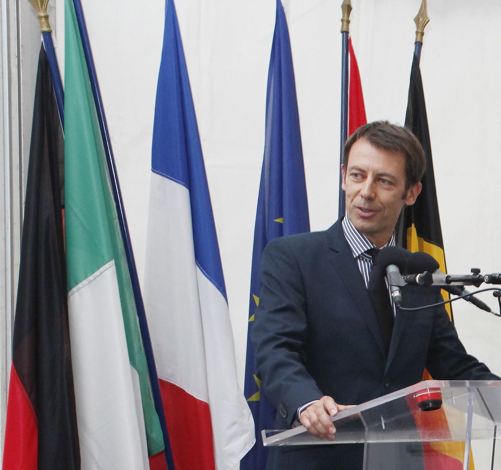 Représentation officielle